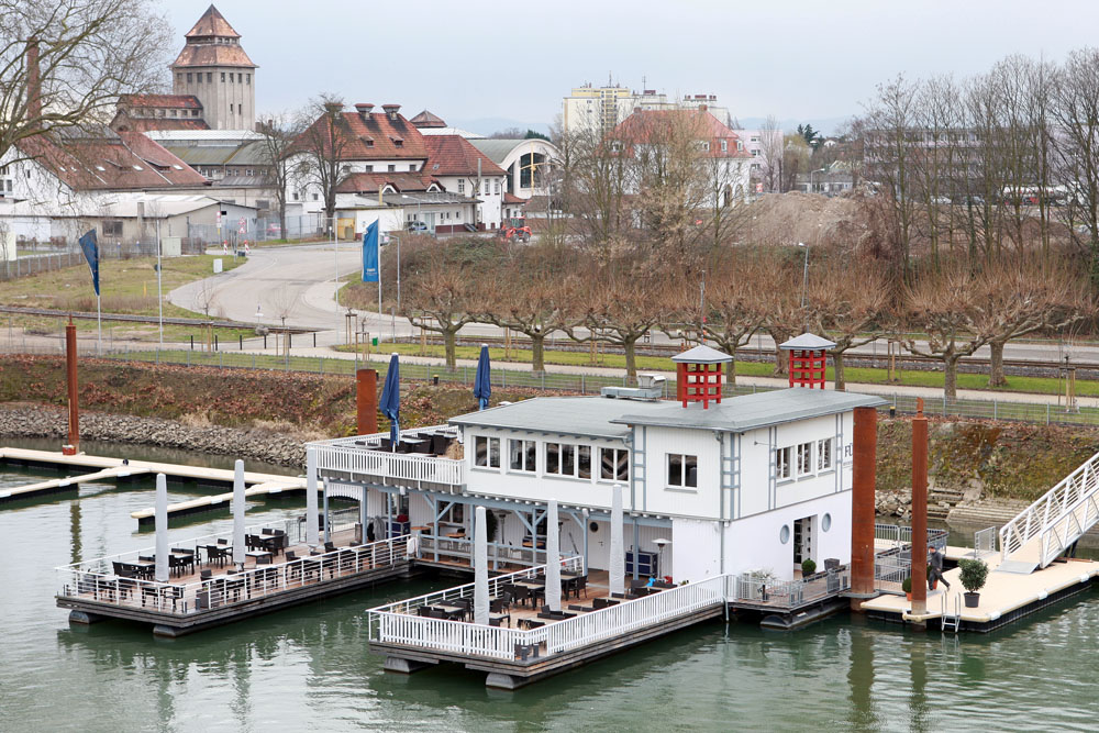 Restaurantschiff Fürst im März 2009 im Floßhafen Worms.